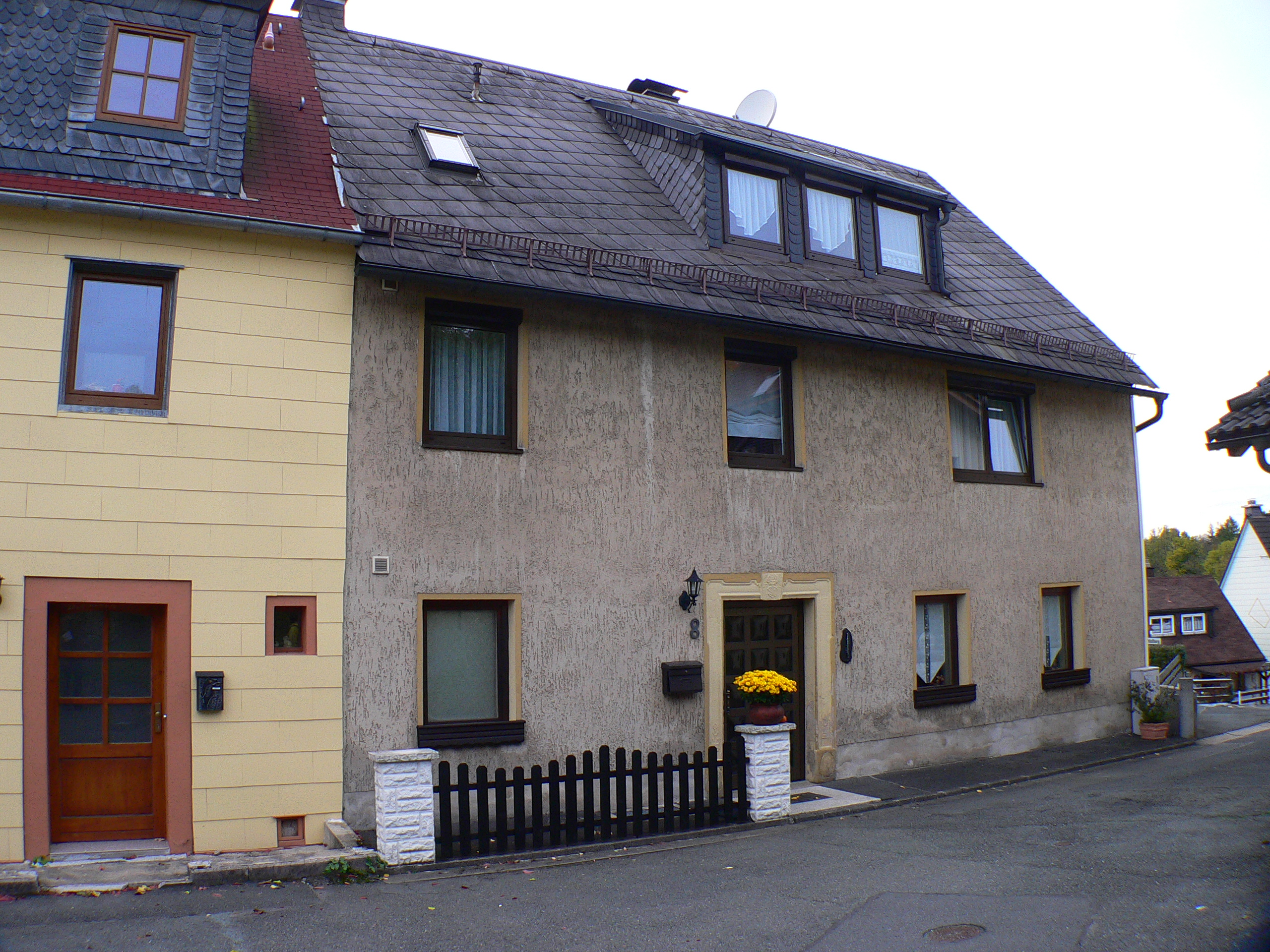 Schloss Oberschwarzenstein in Schwarzenbach am Wald, Bayern, Regierungsbezirk Oberfranken, Landkreis Hof